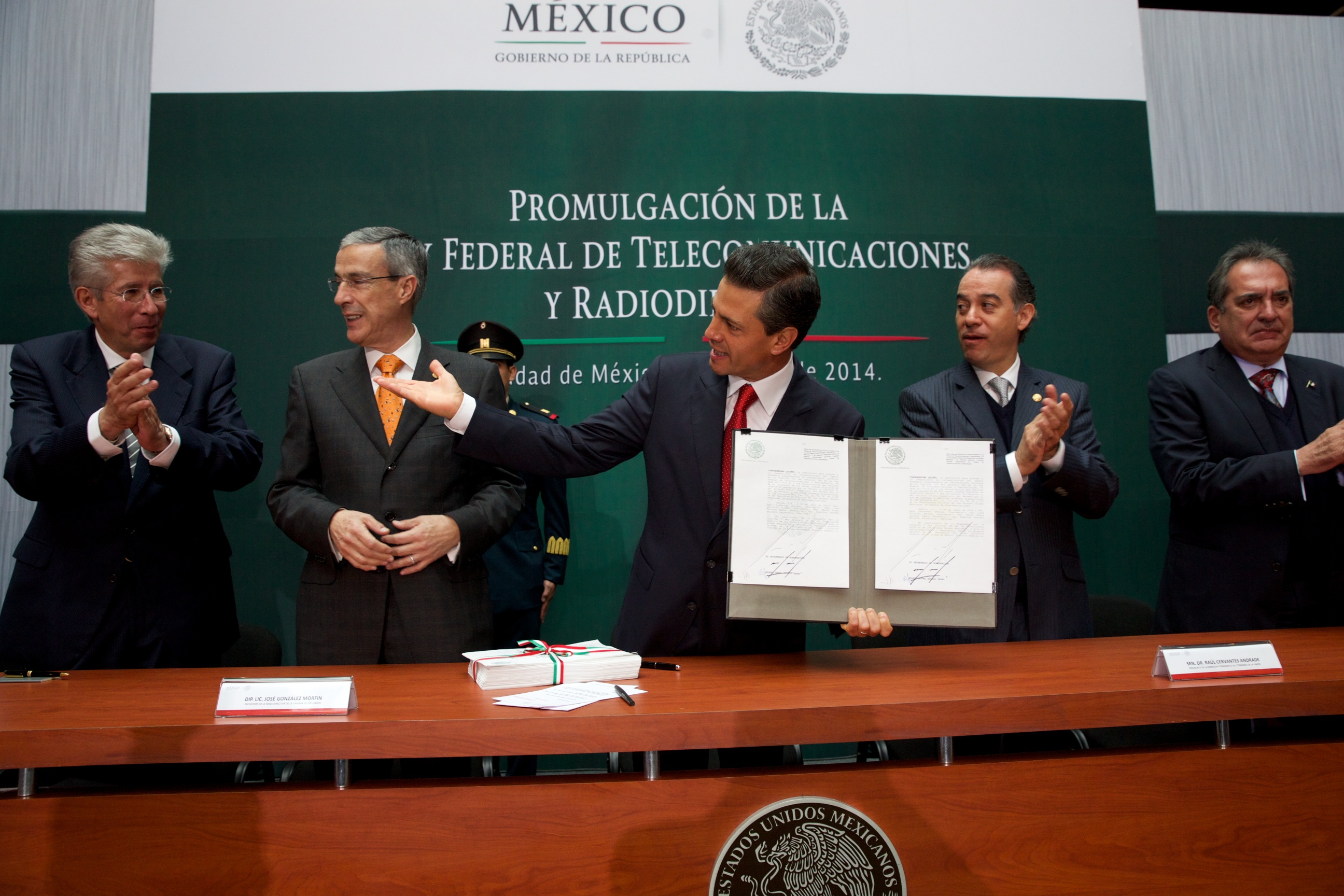 Promulgación de la Legislación Secundaria de las Reformas en materia de Telecomunicaciones y Radiodifusión. Palacio Nacional, Ciudad de México. 14 de julio de 2014.